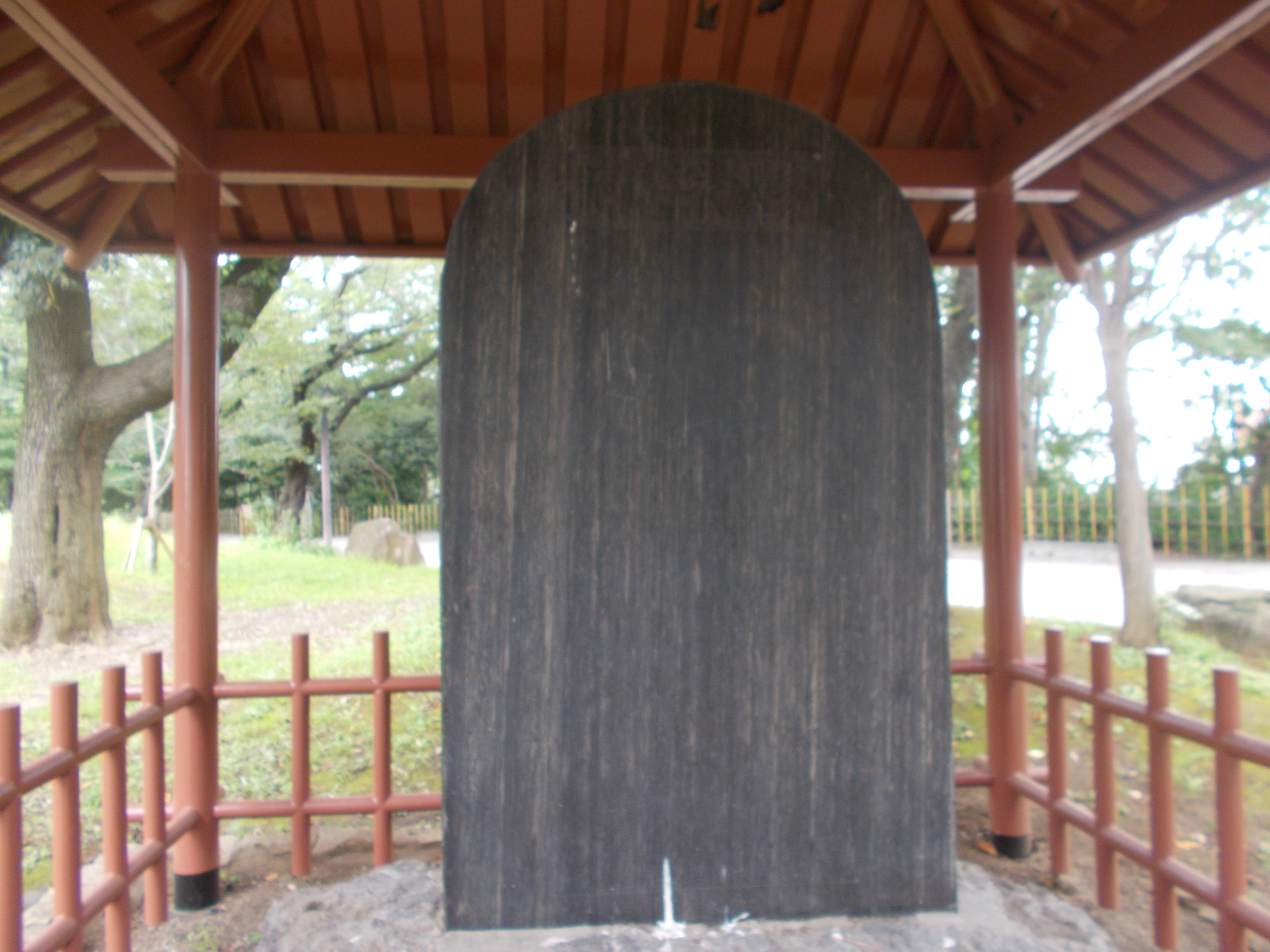 東京都北区の飛鳥山公園にある桜の賦の碑